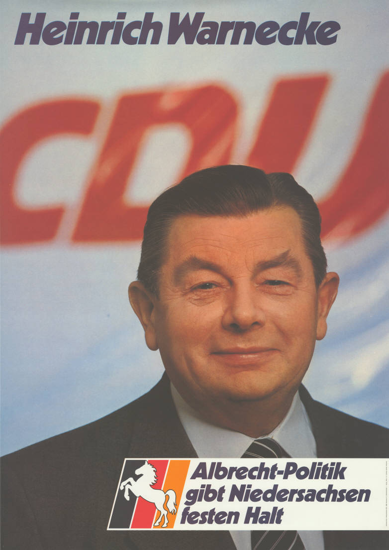 Heinrich Warnecke CDU Albrecht-Politik gibt Niedersachsen festen Halt Abbildung: Porträtfoto - Nationalfarben mit Niedersachsenross Plakatart: Kandidaten-/Personenplakat mit Porträt Auftraggeber: Verantw.: Niedersachsen-CDU, Hannover Drucker_Druckart_Druckort: Willy F.P. Fehling GmbH, Hannover Objekt-Signatur: 10-008 : 487 Bestand: Landtagswahlplakate Niedersachsen (10-008) GliederungBestand10-18: Landtagswahlplakate Niedersachsen (10-008) » CDU Lizenz: KAS/ACDP 10-008 : 487 CC-BY-SA 3.0 DE